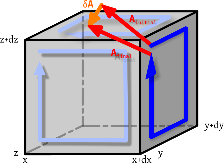 Schéma illustrant l'interprétation de l'identité de Bianchi. Dessin perso, logiciel Xaralx.